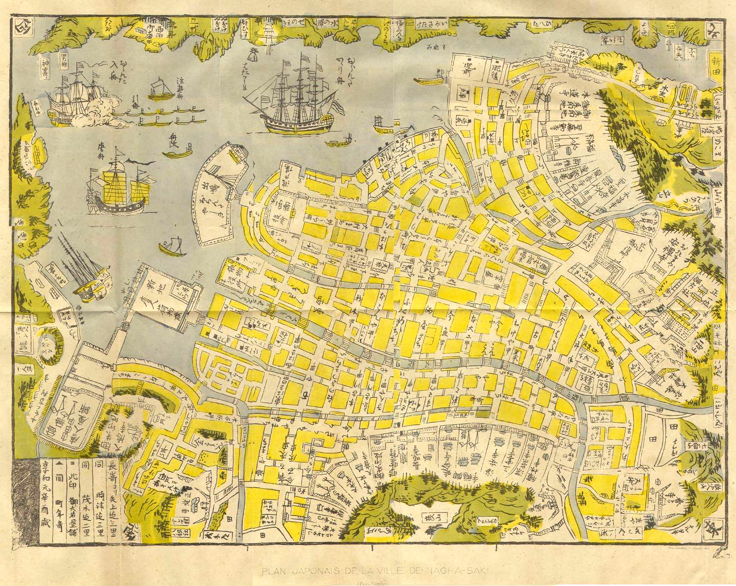 Vue et plan de la ville de Nagasaki au Japon. Hors-texte du livre "Notes sur le Japon, la Chine et l'Inde" de Charles de Chassiron, 1861